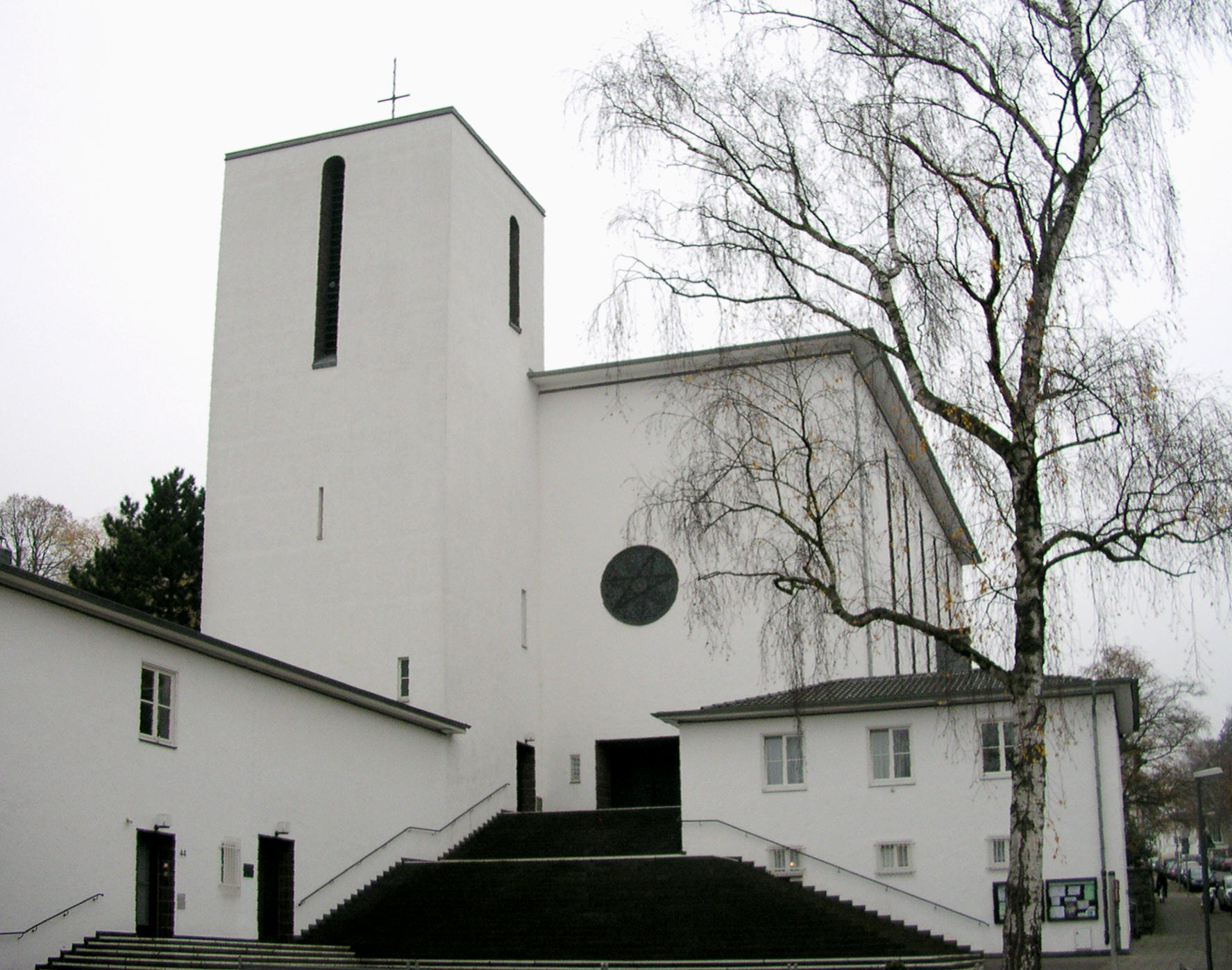 rk. Pfarrkirche „Heilig Geist“ in Aachen, Architekt Otto Bongartz (1930)